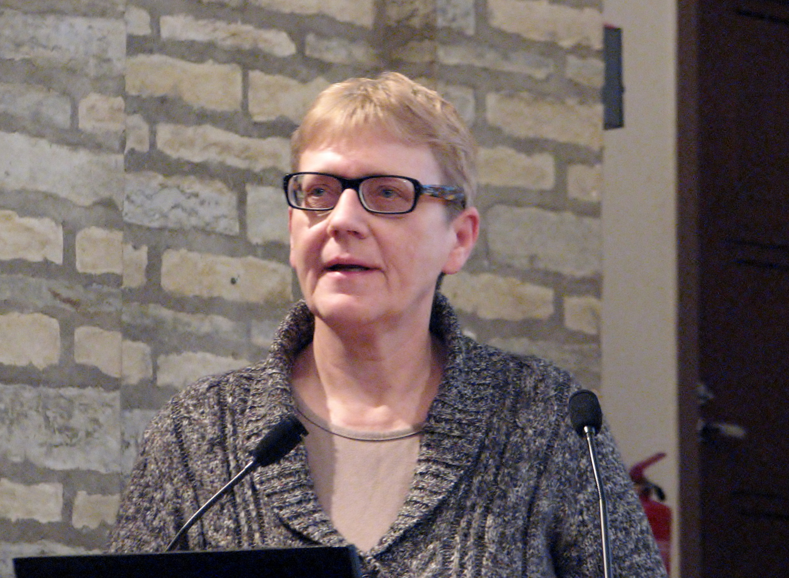 Sirje Nilbe Eesti Raamatukoguhoidjate Ühingu koosolekul